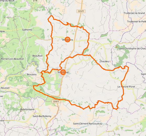 Carte de la commune nouvelle et de ses communes déléguées